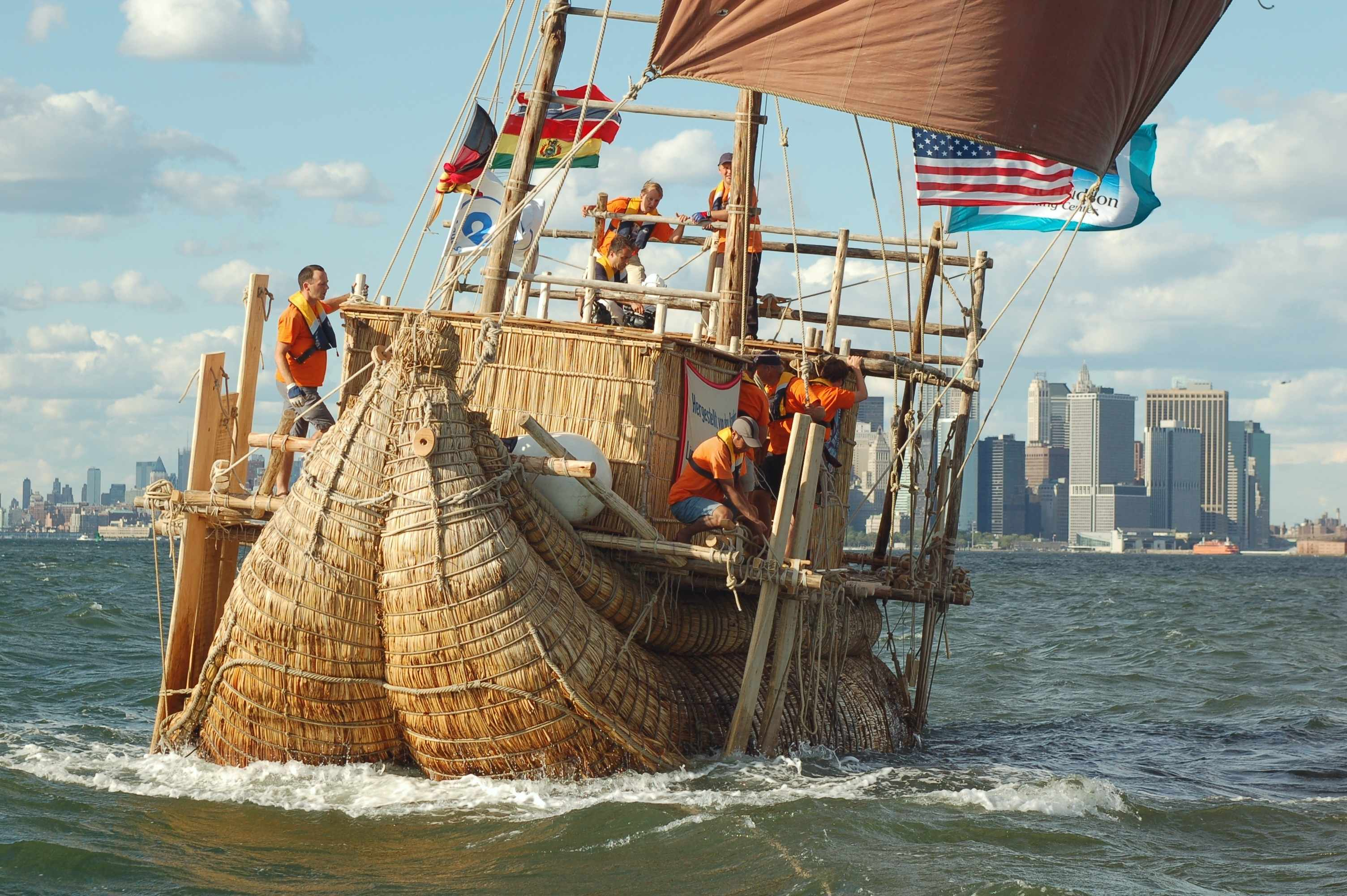 Der Aufbruch der ARBORA III